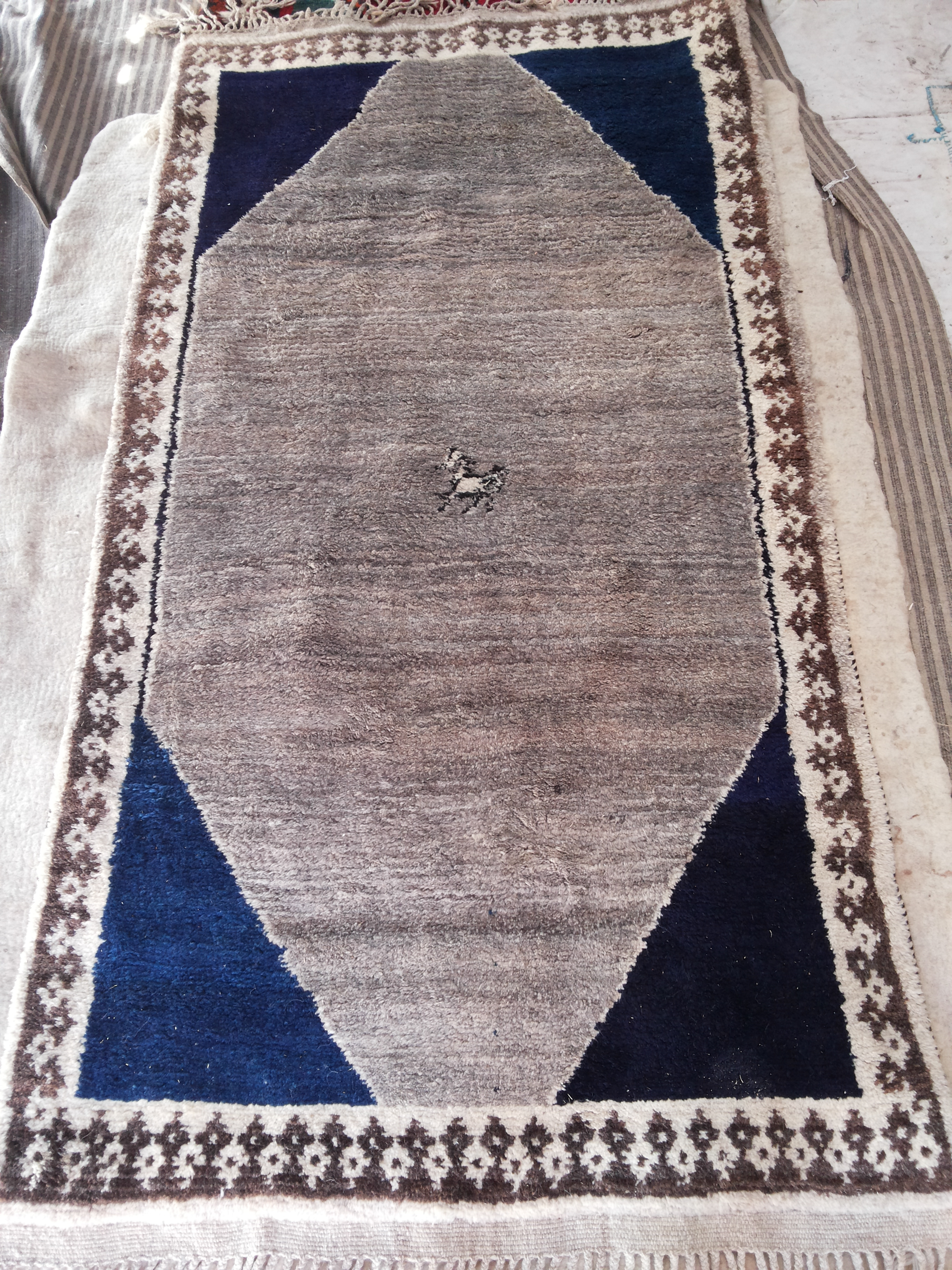 تصویری از گبه بافته شده در ایل قشقائی